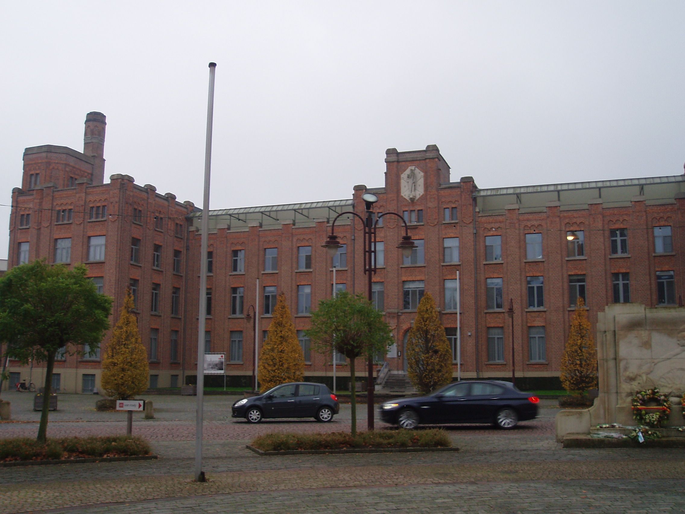 Klooster Sint-Norbertushuis